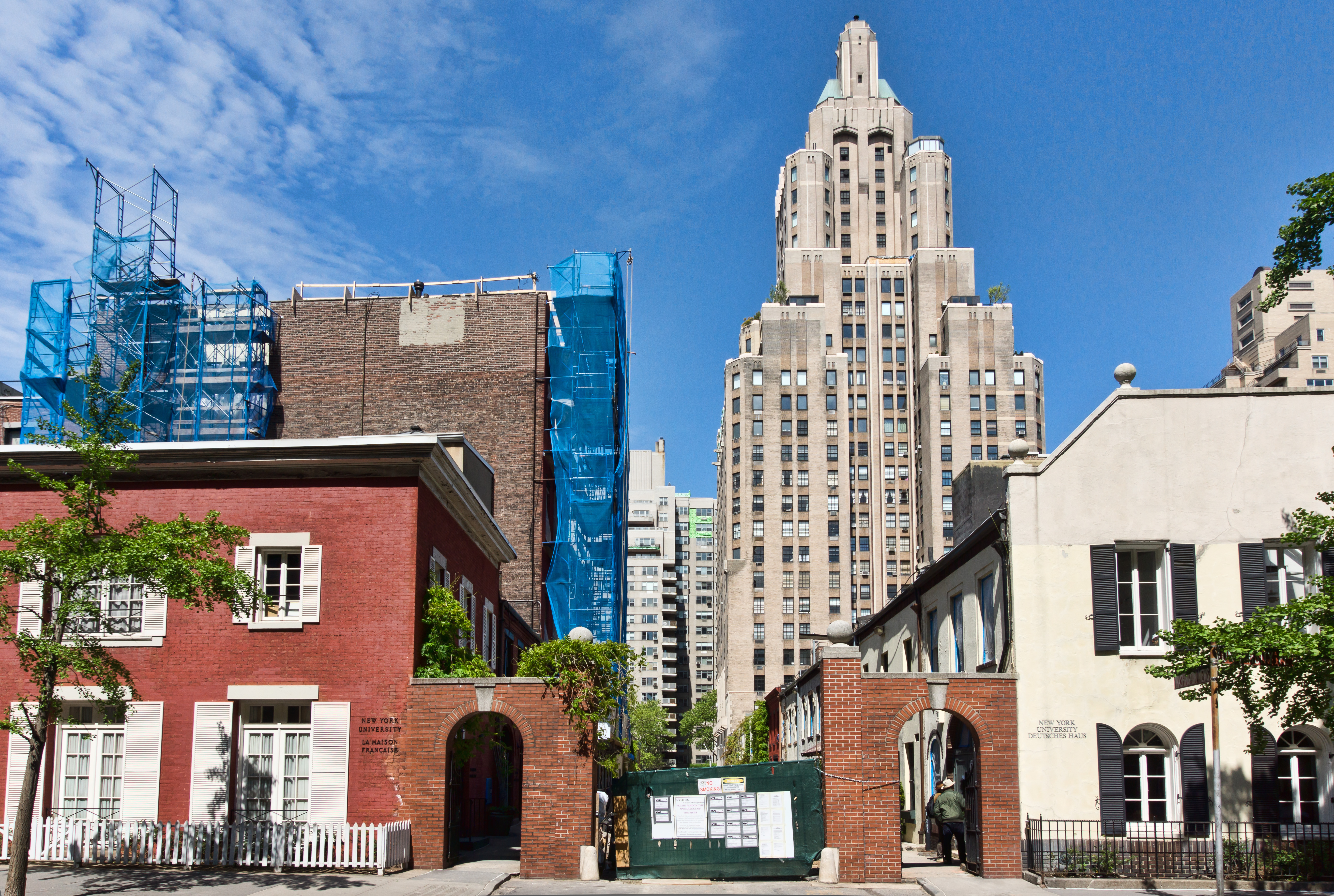 NYC - New York University - maisons française et allemande